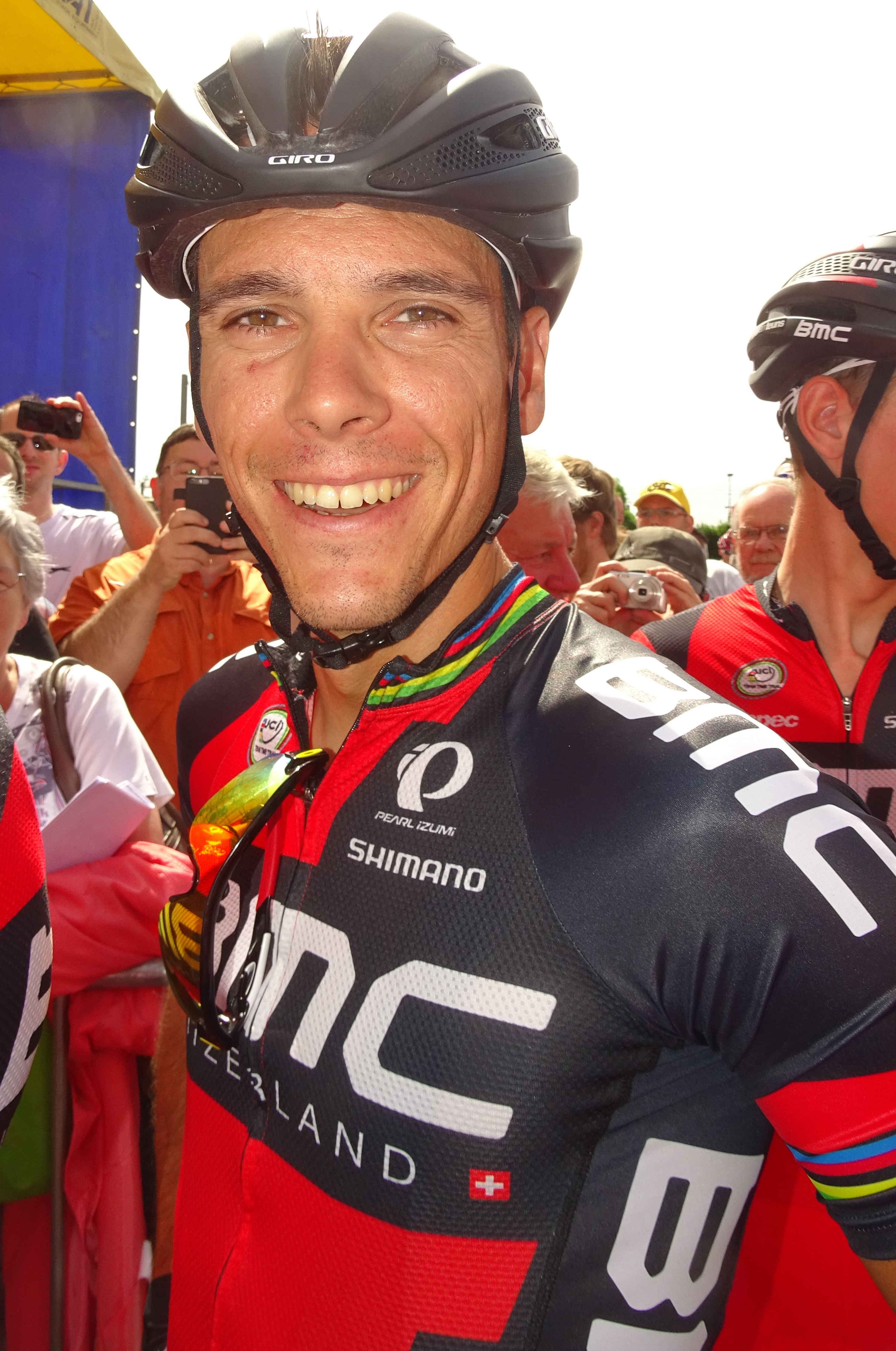 Reportage réalisé le mercredi 22 juillet à l'occasion du départ du Grand Prix Pino Cerami 2015 à Saint-Ghislain, Belgique.